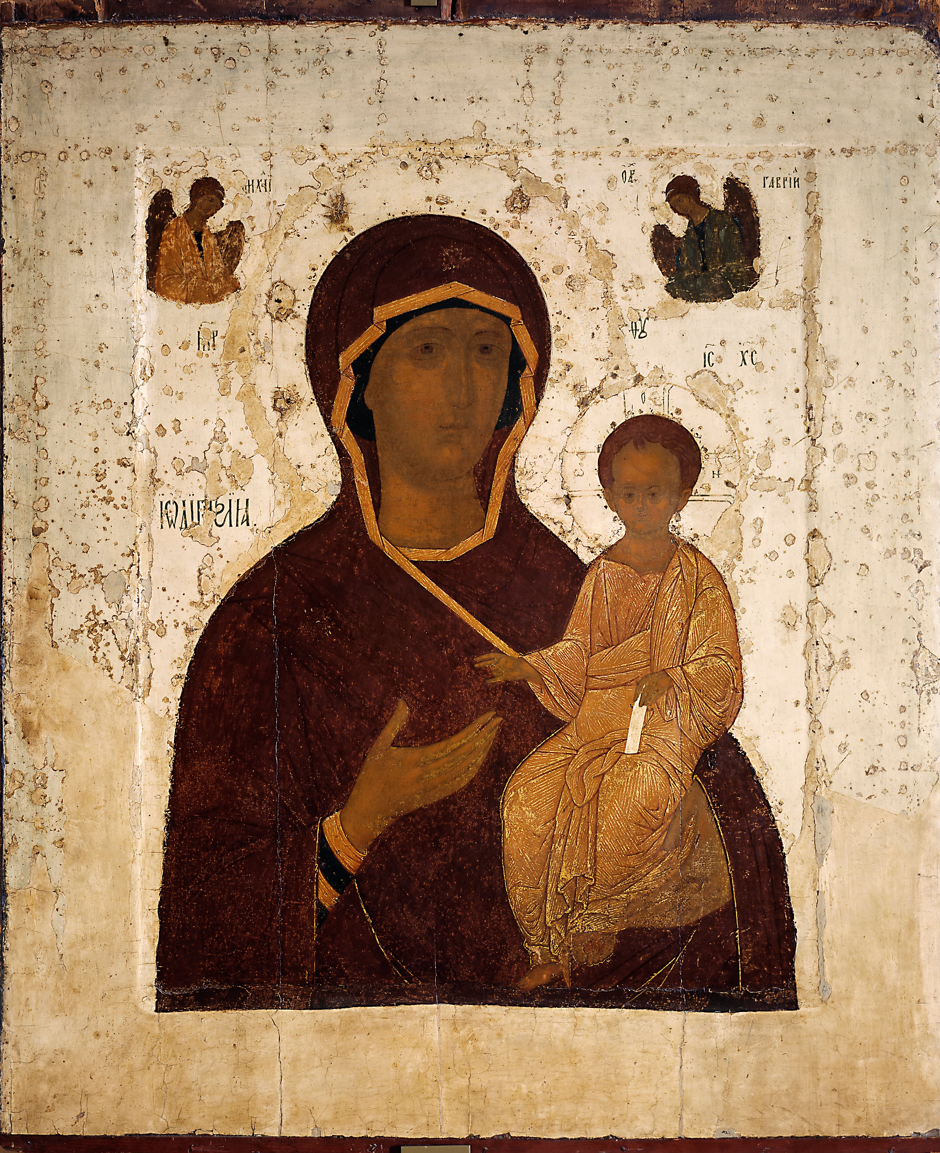 Самая ранняя из дошедших до нас работ Дионисия. Как сообщает летопись, во время пожара 1482 года обгорела икона греческого происхождения, утратив красочный слой. Дионисию был дан заказ написать на этой же доске новое изображение по той же иконографической схеме. Икона, поновленная Дионисием, сохраняет особенности древней иконографии прославленного чудотворного образа константинопольского монастыря Одегон (согласно летописному свидетельству, в «ту же меру; в тот же образ»). Живопись иконы, в особенности ее личное письмо [«личное», с ударением на букву «о», т.е. письмо ликов], обладает признаками манеры Дионисию. Черты ликов прорисованы в характерной изящной и легкой манере.